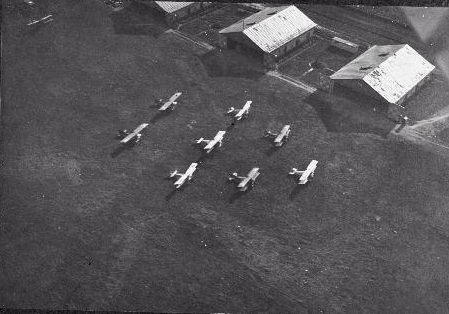 Самолётная база в Ласнамяэ (аэрофото)